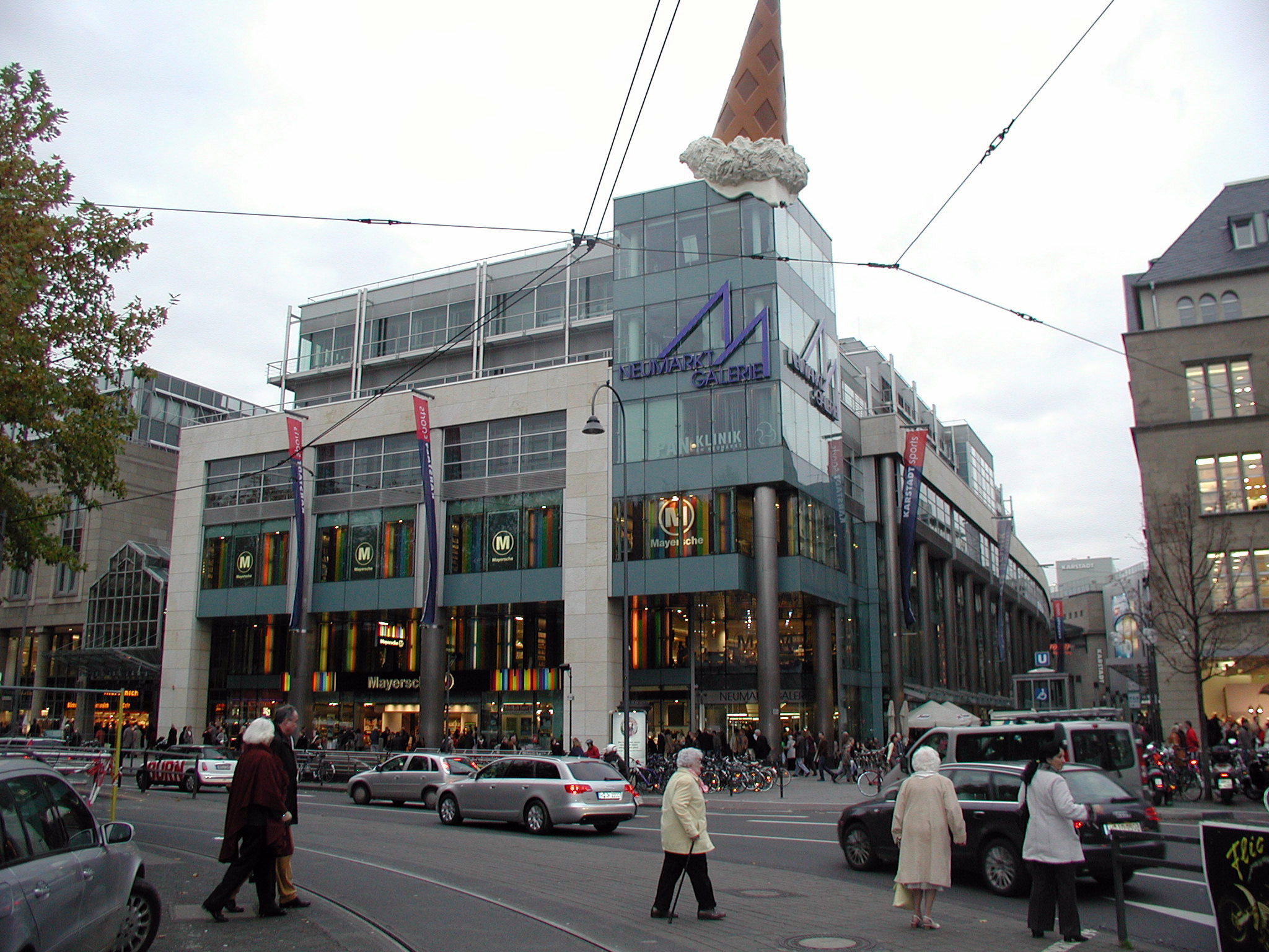 Köln Neumarkt, Ecke Zeppelin